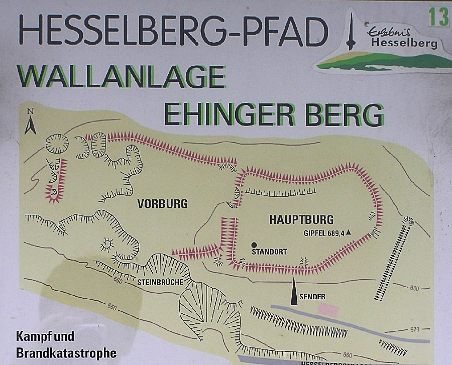 Ausschnitt aus einer Informationstafel des Hesselbergpfades Fotograf: Oswald Engelhardt